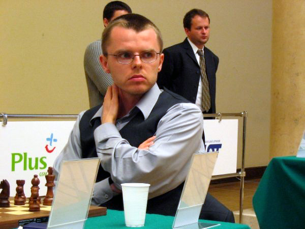 Tomasz Markowski, Warsaw 2004